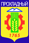 Герб г.Прохладный